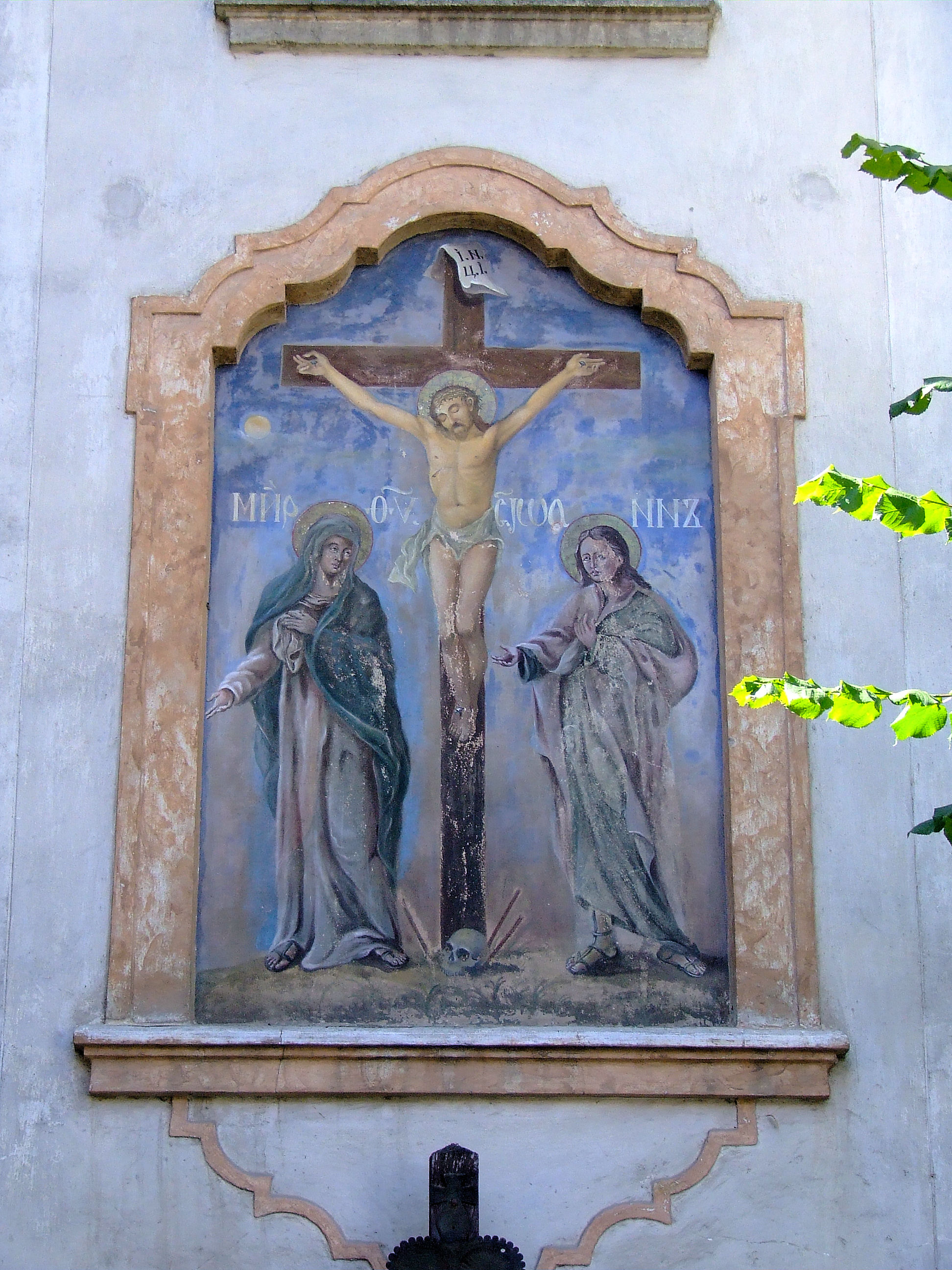 Preobrazsenszka-templom (Szentendre, Bogdányi út 42.) This is a photo of a monument in Hungary, Identifier: 7338